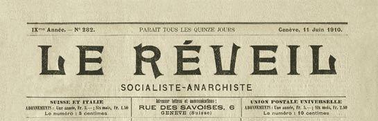 Le Réveil socialiste-anarchiste - Genève (Suisse) - manchette du numéro 282 du 11 juin 1910